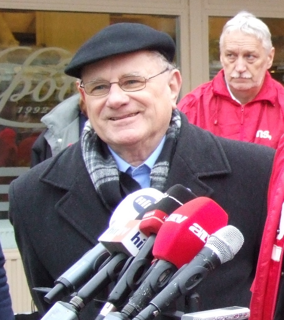 A 2014-es újpesti időközi országgyűlési választás szocialista kampányeseménye: Horváth Imre jelölt